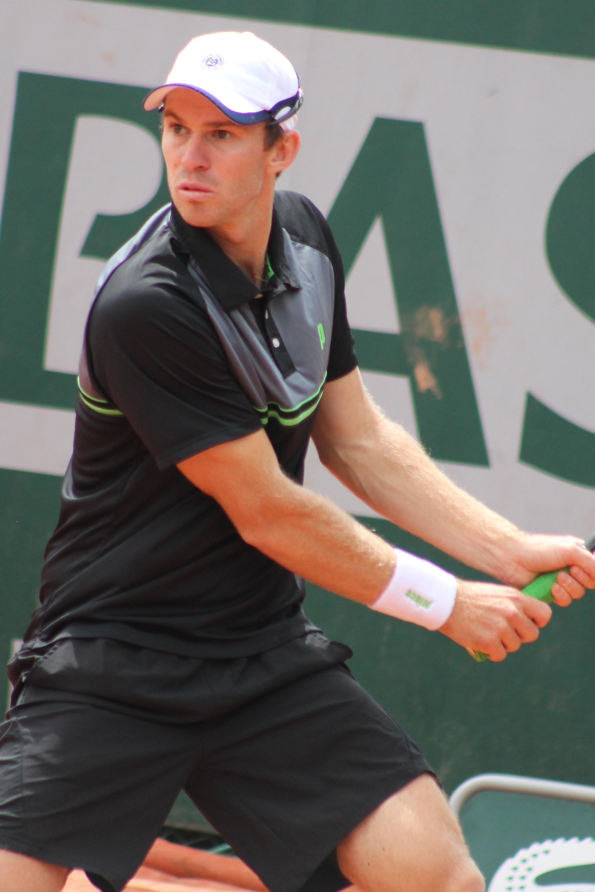 Peers RG15 (28)